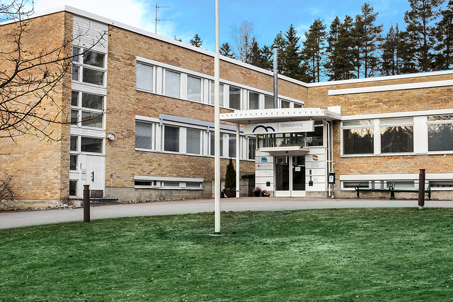 Aikuiskoulutusosasto ja oppisopimustoimiston pääsisäänkäynti Karkun Voimarinteellä.